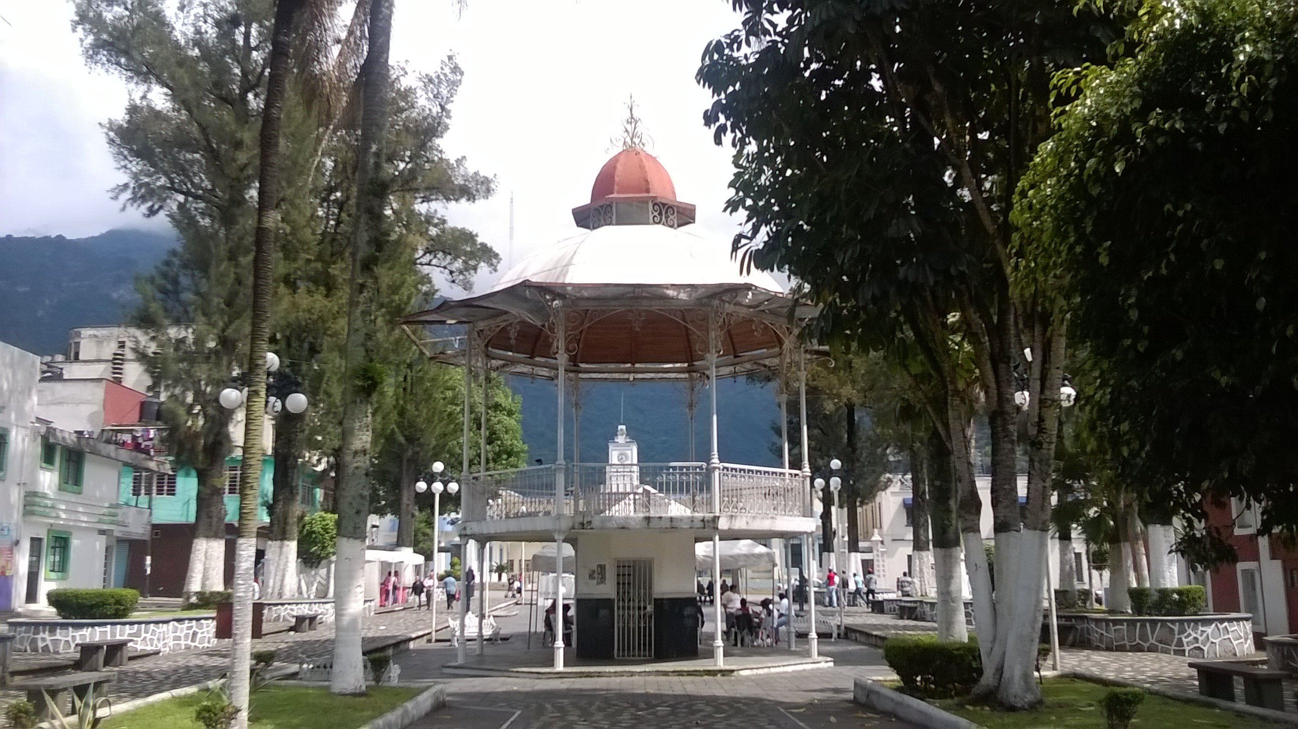 Parque de Río Blanco, Veracruz